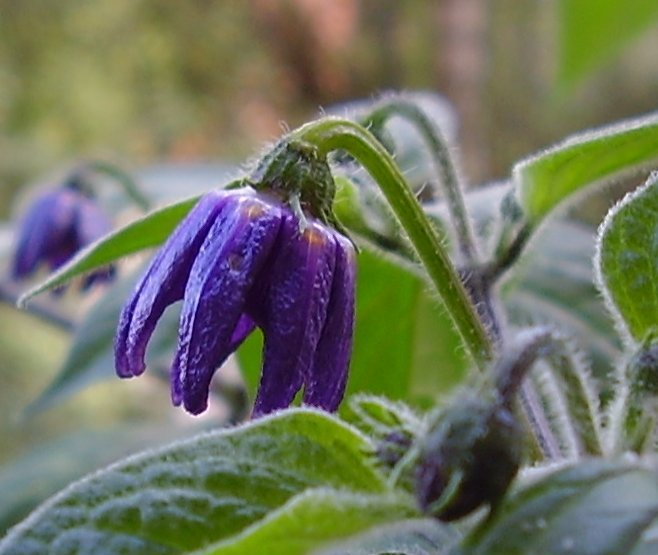 Chili blossom, Capsicum pubescens, Rocoto Manzano Rojo